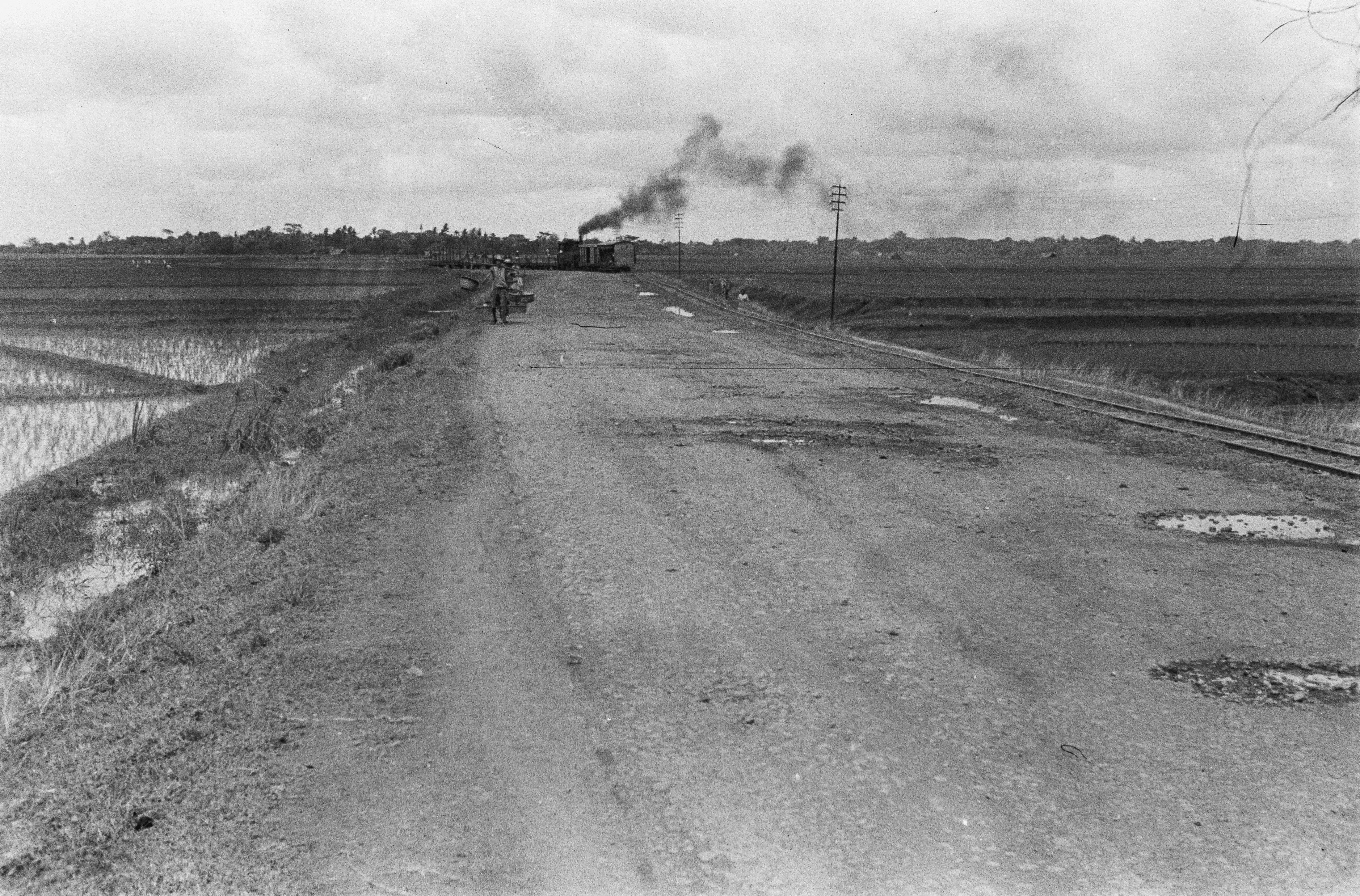 Collectie / Archief : Fotocollectie Dienst voor Legercontacten Indonesië Reportage / Serie : [ onbekend ] Beschrijving : Een brede weg door de rijstvelden. Aan een zijde een tram- of spoorweg. In de verte een trein Datum : 20 december 1947 Locatie : Cikampek, Indonesië, Nederlands-Indië, Wadas Fotograaf : Huisman, B. / DLC Auteursrechthebbende : Nationaal Archief Materiaalsoort : Negatief (zwart/wit) Nummer archiefinventaris : bekijk toegang 2.24.04.03 Bestanddeelnummer : 474-4-1